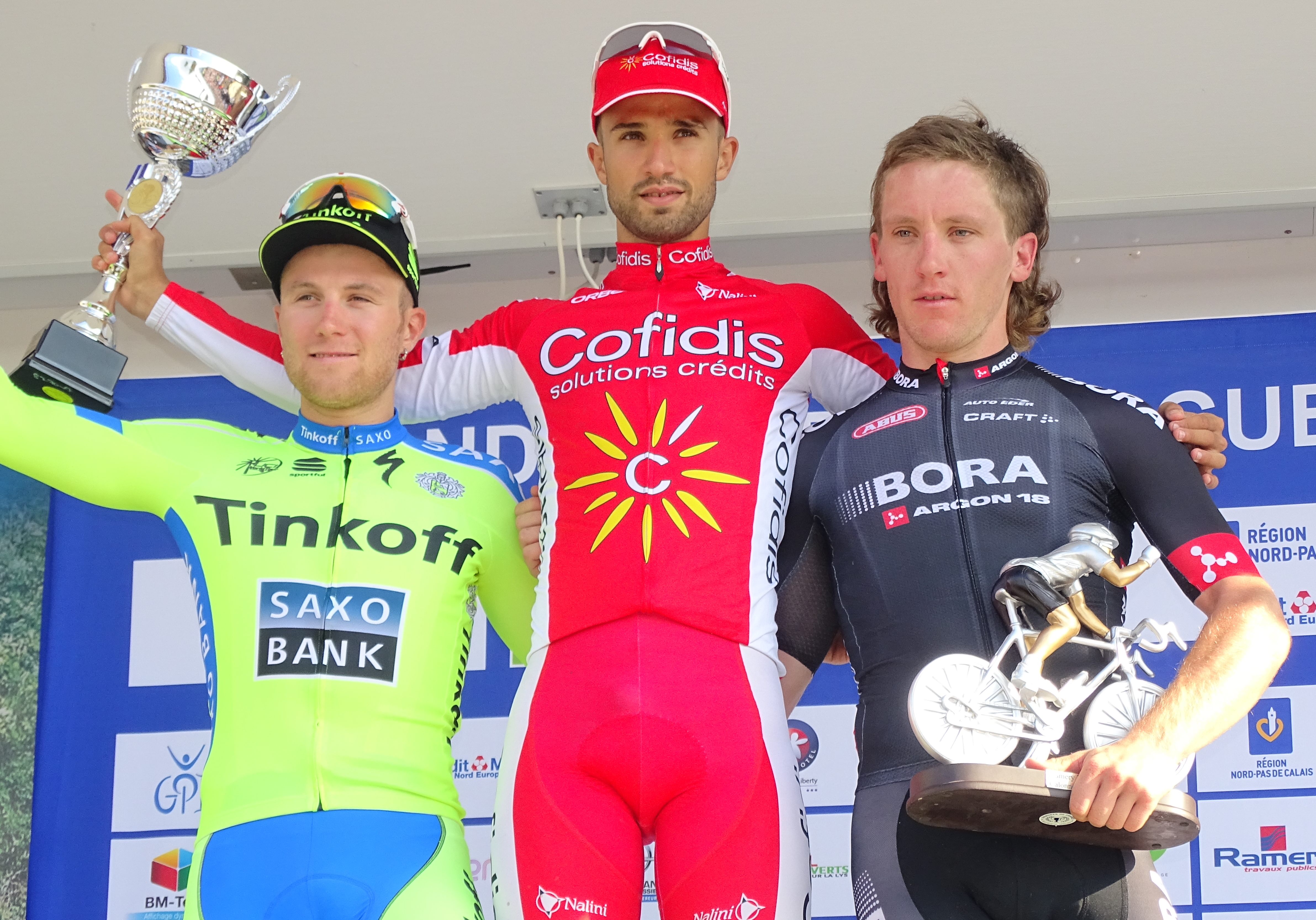 Reportage réalisé le dimanche 20 septembre à l'occasion du départ et de l'arrivée du Grand Prix d'Isbergues 2015 à Isbergues, Nord-Pas-de-Calais, France.